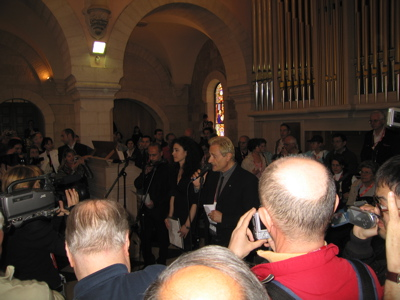 Maria Dangell, Amedeo Minghi and Hakeem Abu Jaleela singing "Jerusalem" in Bethlehem, 2009